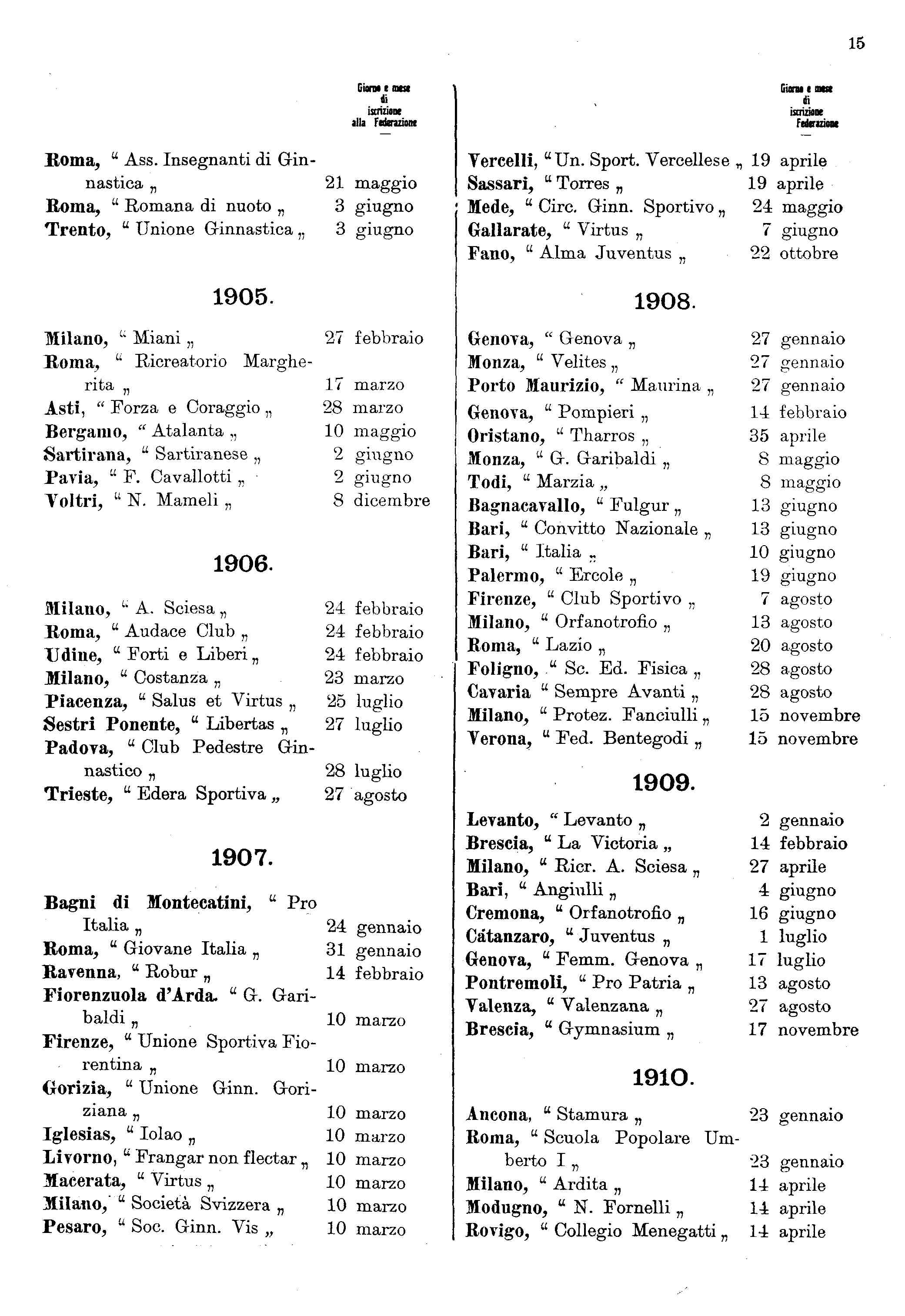 Elenco cronologico delle Società affiliate alla F.G.N.I. nel 1912